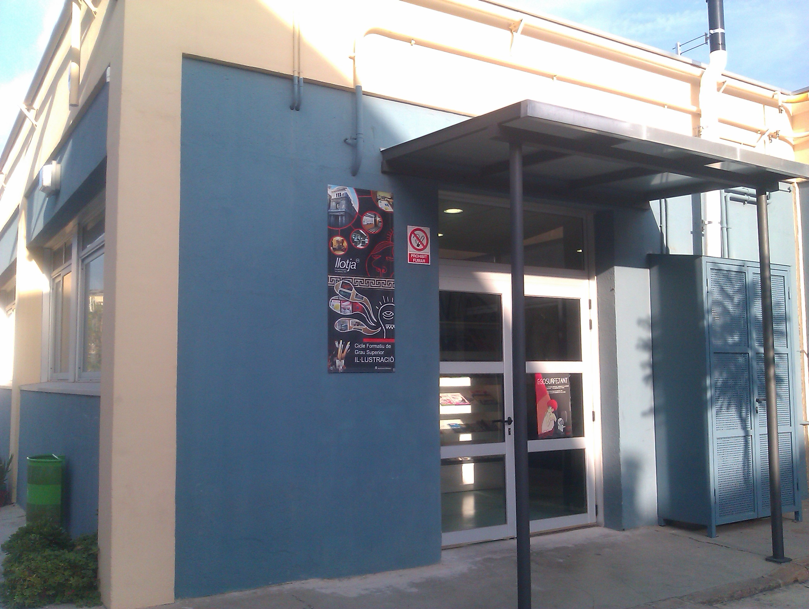 Seu de l'escola d'art Llotja (Sant Andreu de Palomar, Barcelona). Mòdul d'il·lustració